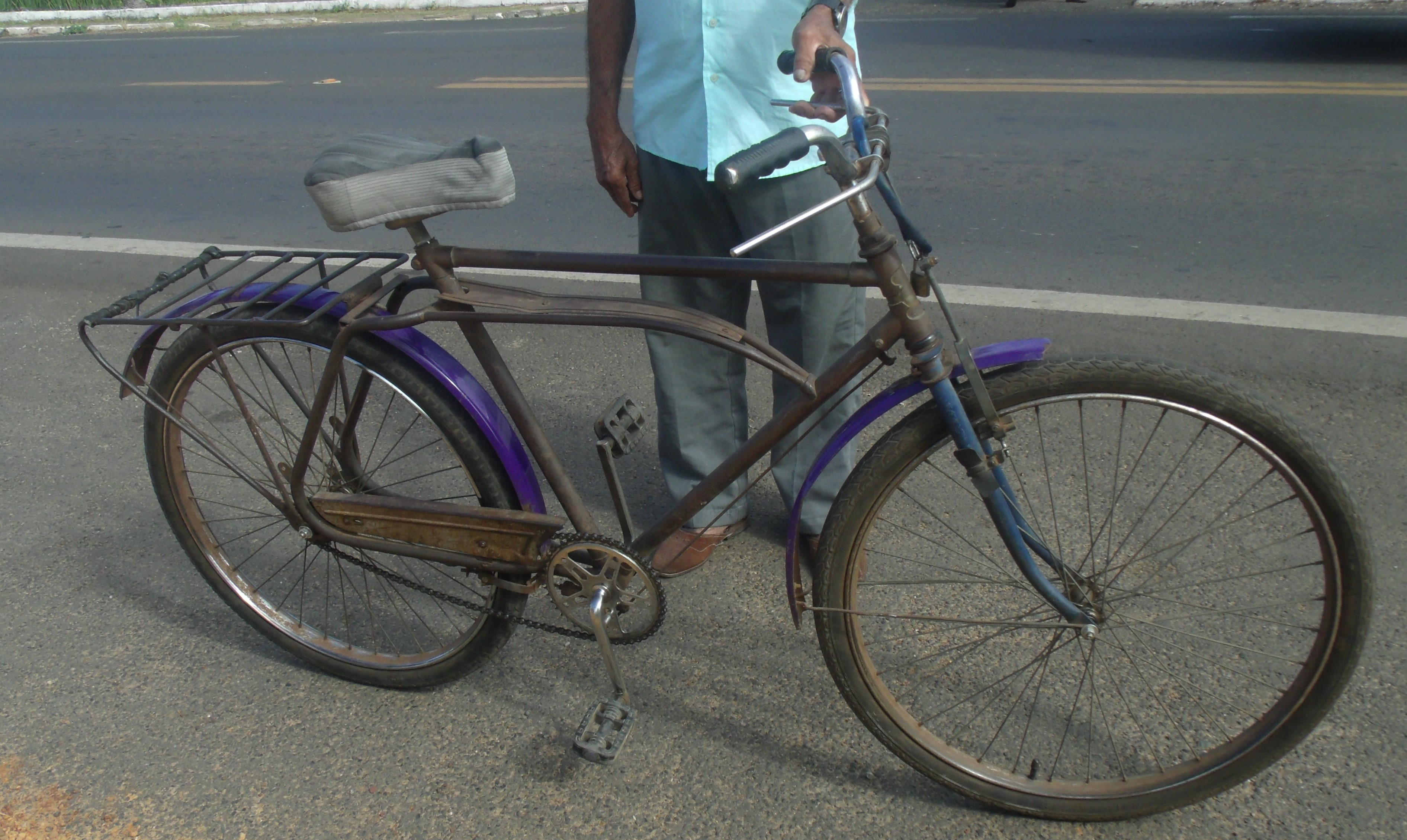 Caloi antiga, o proprietário diz que é um modelo barra forte do início da década de 1970.